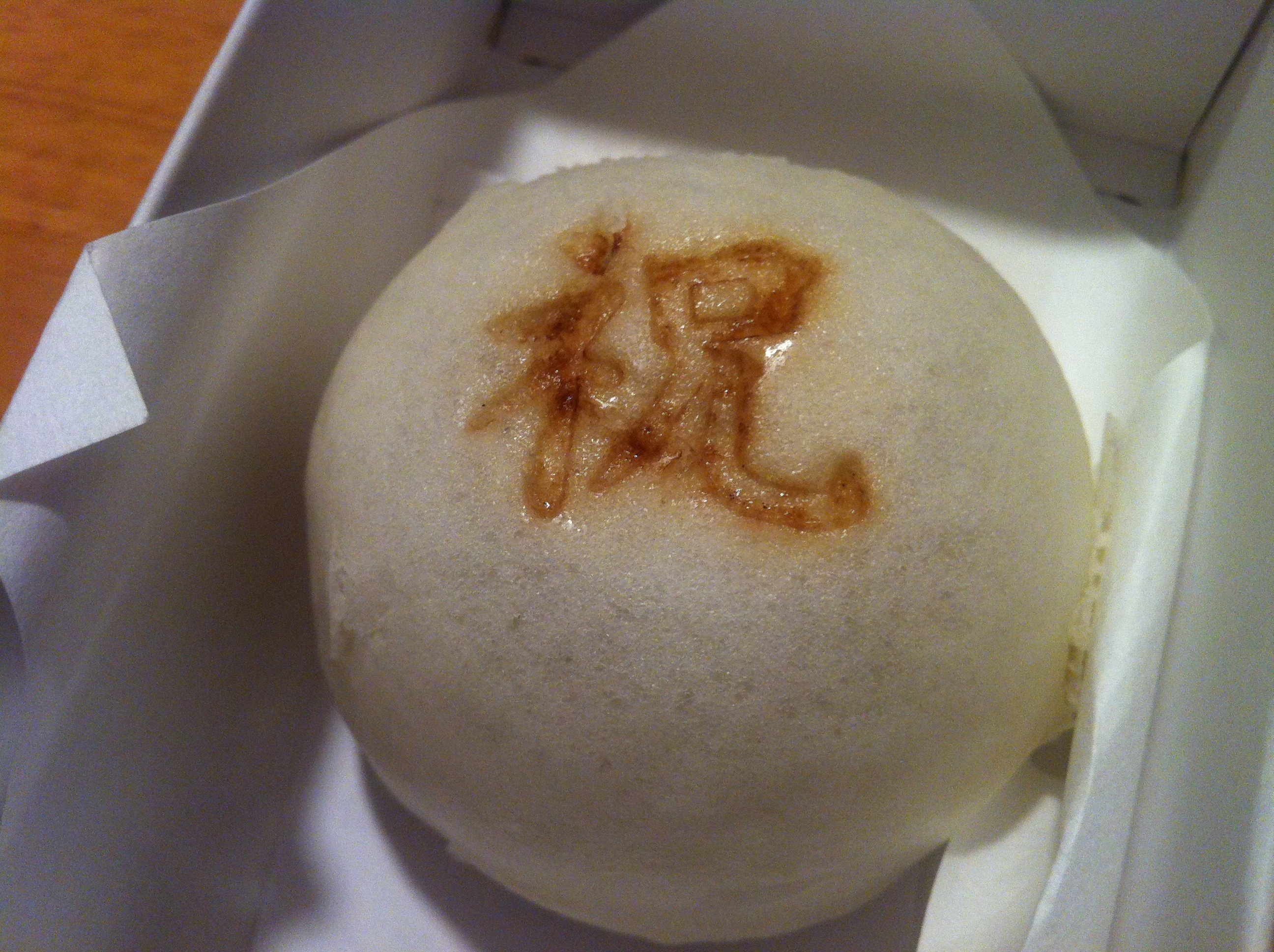 紅白饅頭の白 Kōhaku white bun